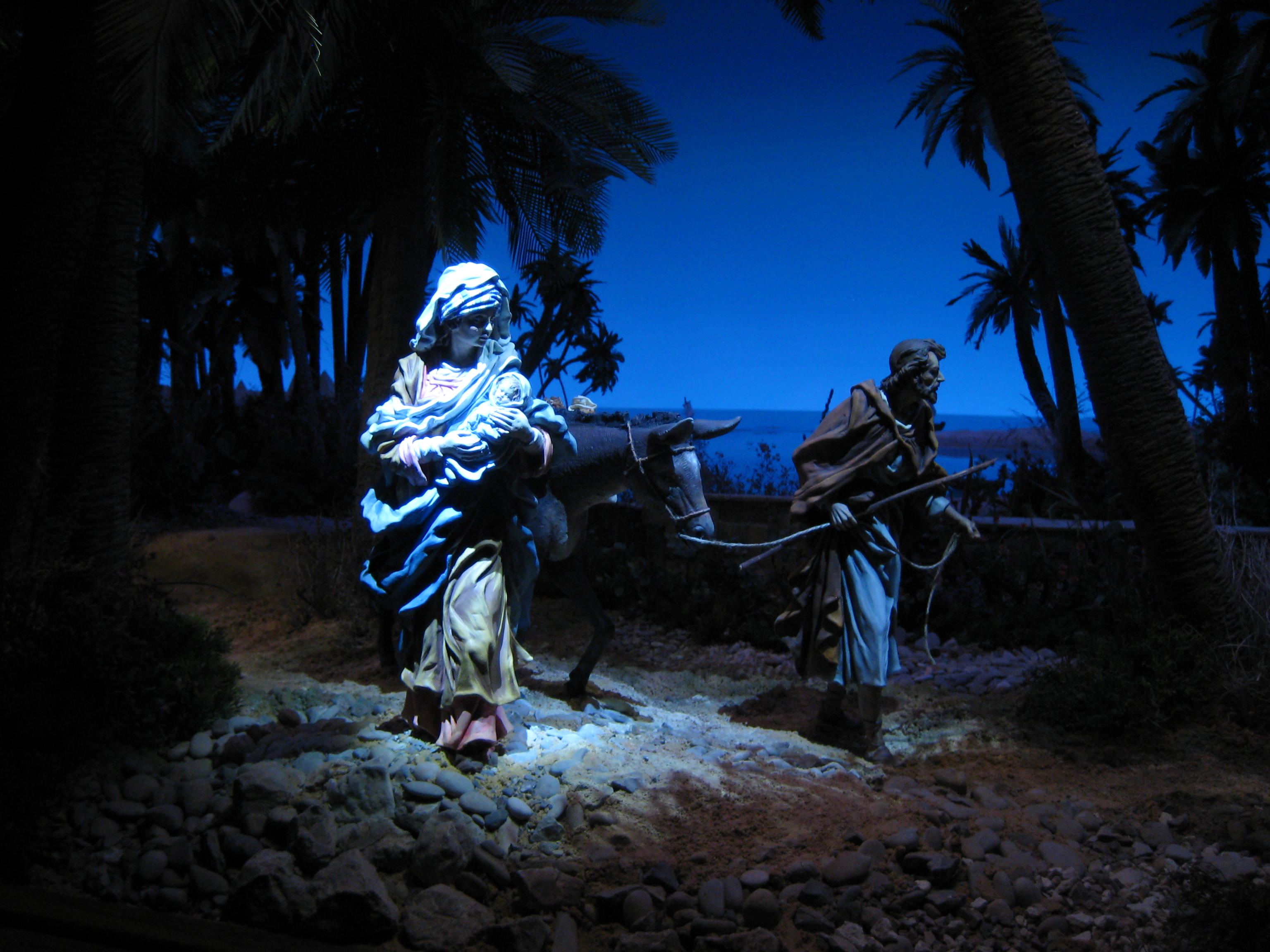 Escena de la Huida a Egipto del nacimiento monumental "Salve, Emmanuel". Muestra del Belén de Jerez de la Frontera. Autor de la escena: Miguel Pérez Carrillo